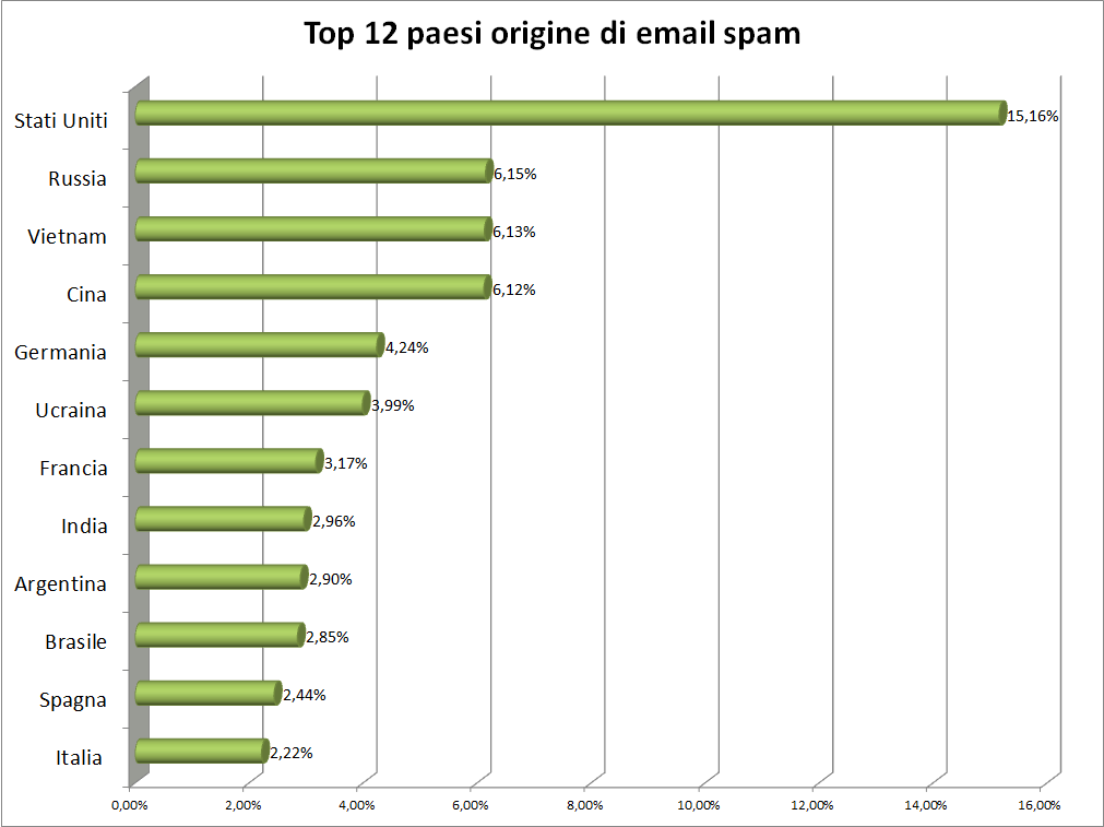 Fonte dei dati